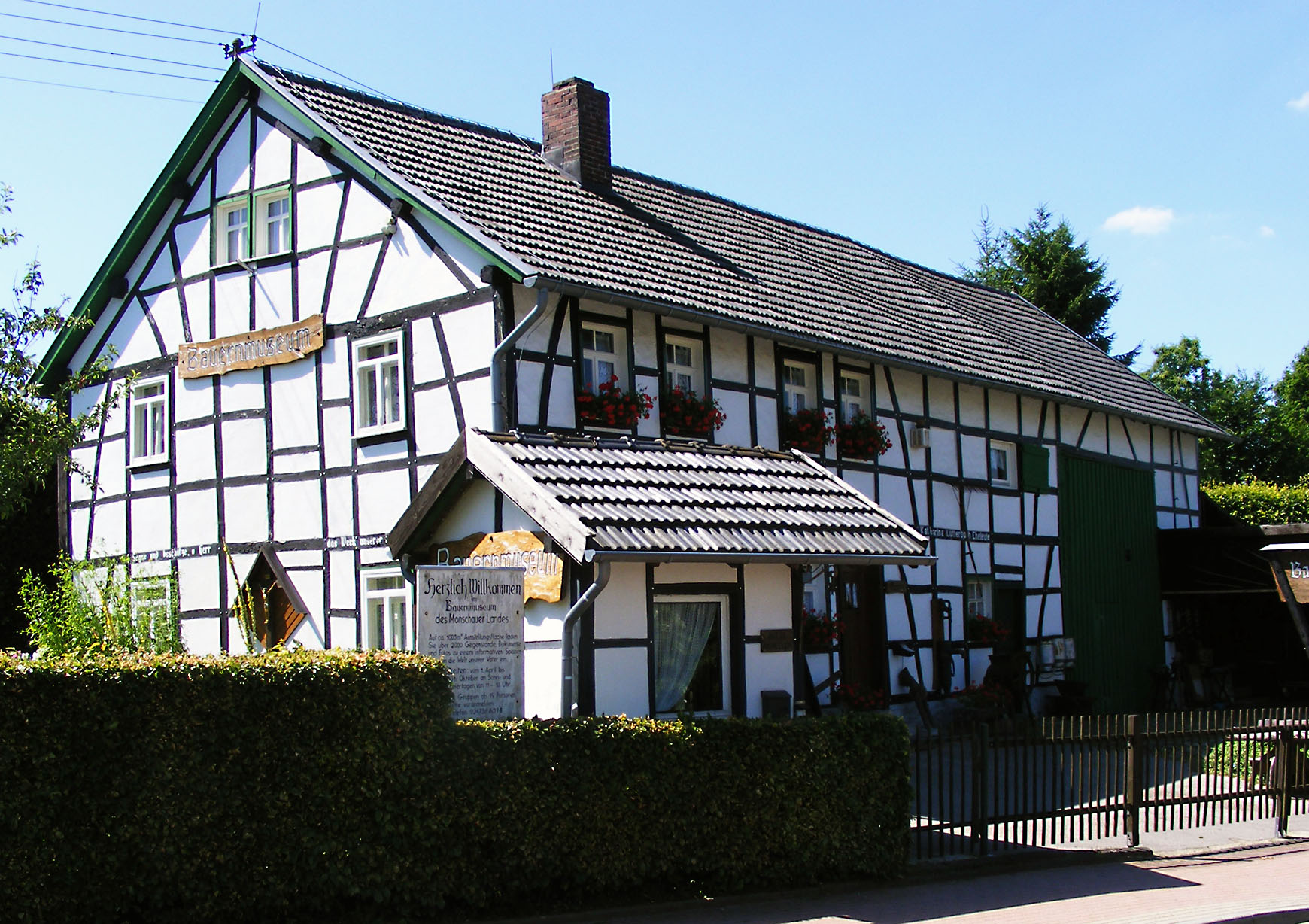 Bauernmuseum Lammersdorf (Eifel, Deutschland)